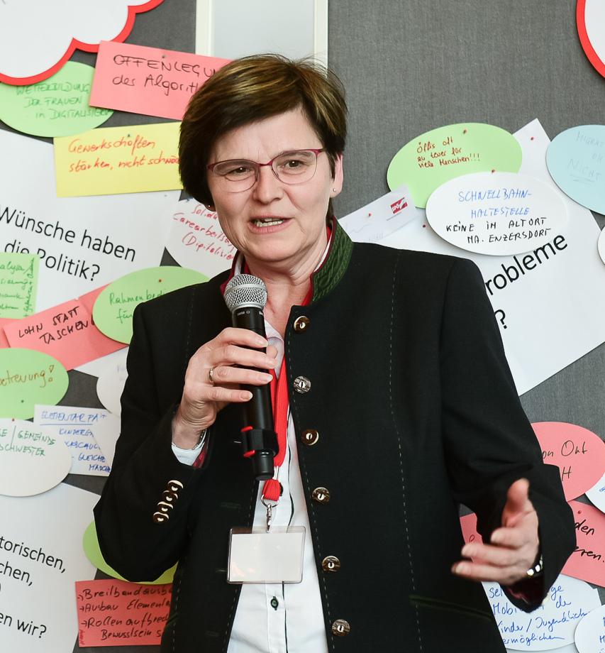 Brauchen Frauen mehr Stadt am Land?